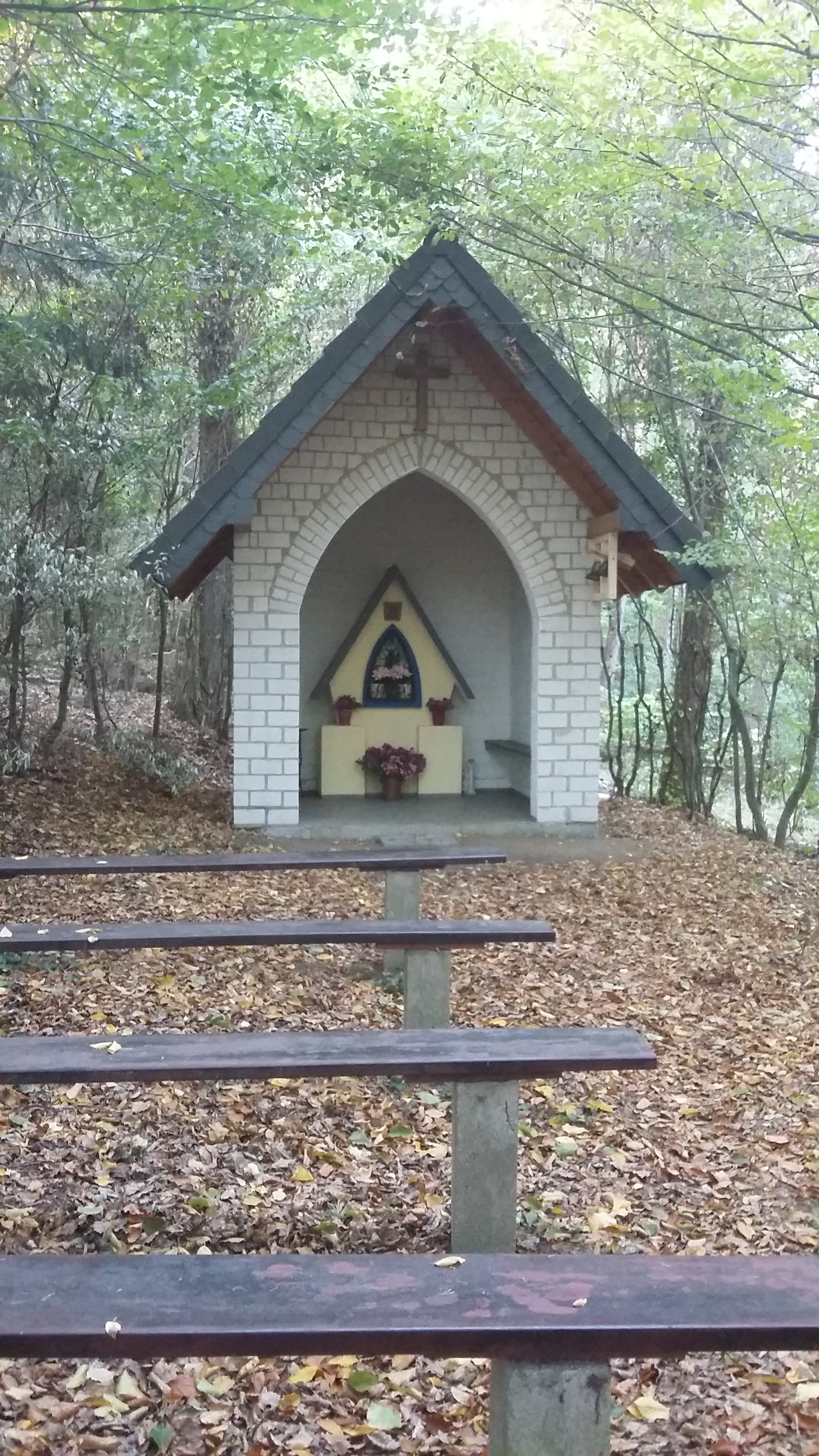 Pfaffenwiesbach - Bildstockkapelle am Usinger Weg 2018